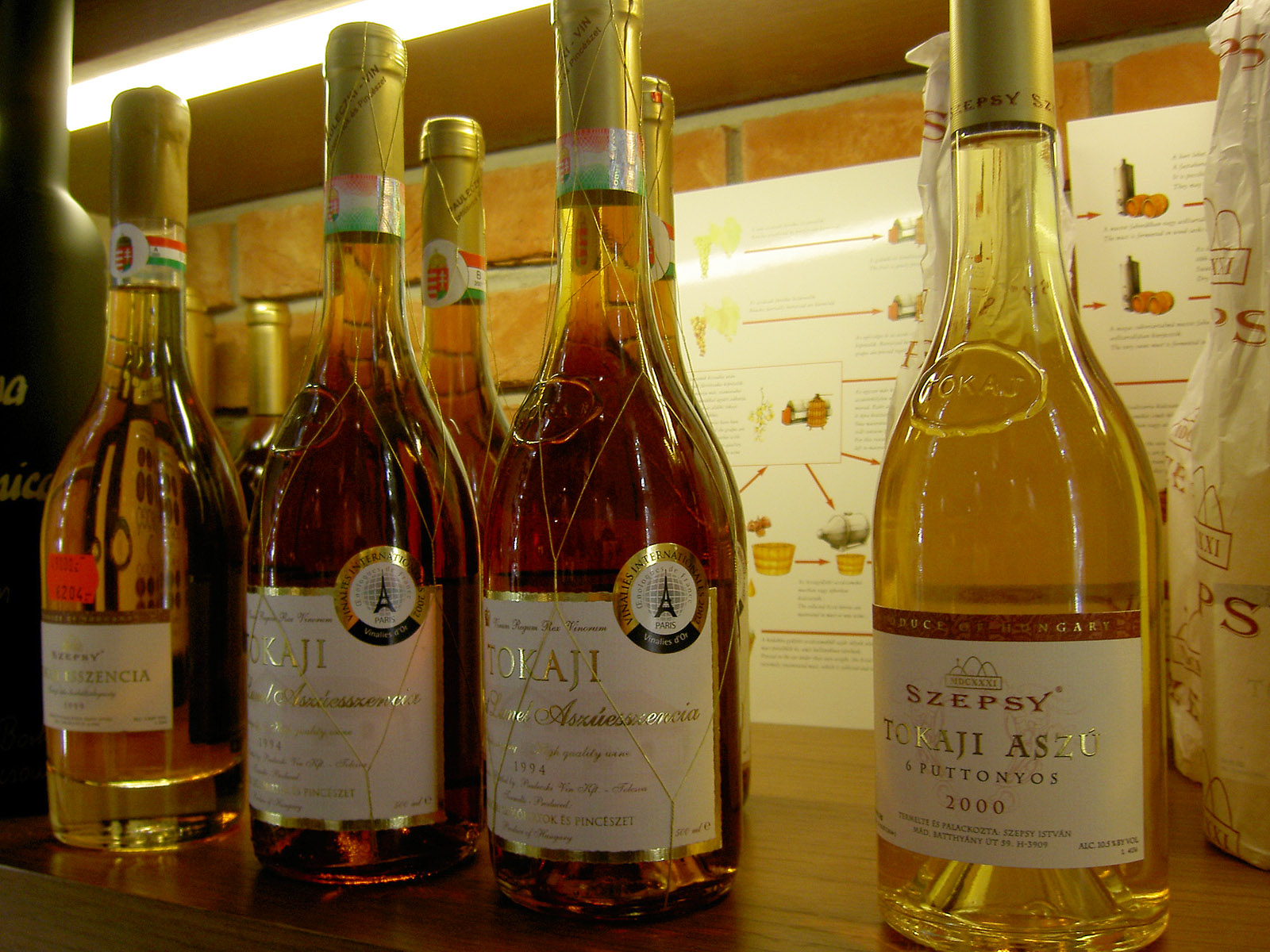 Photo taken at 2005.11.13 09:30, Hungary Budapest